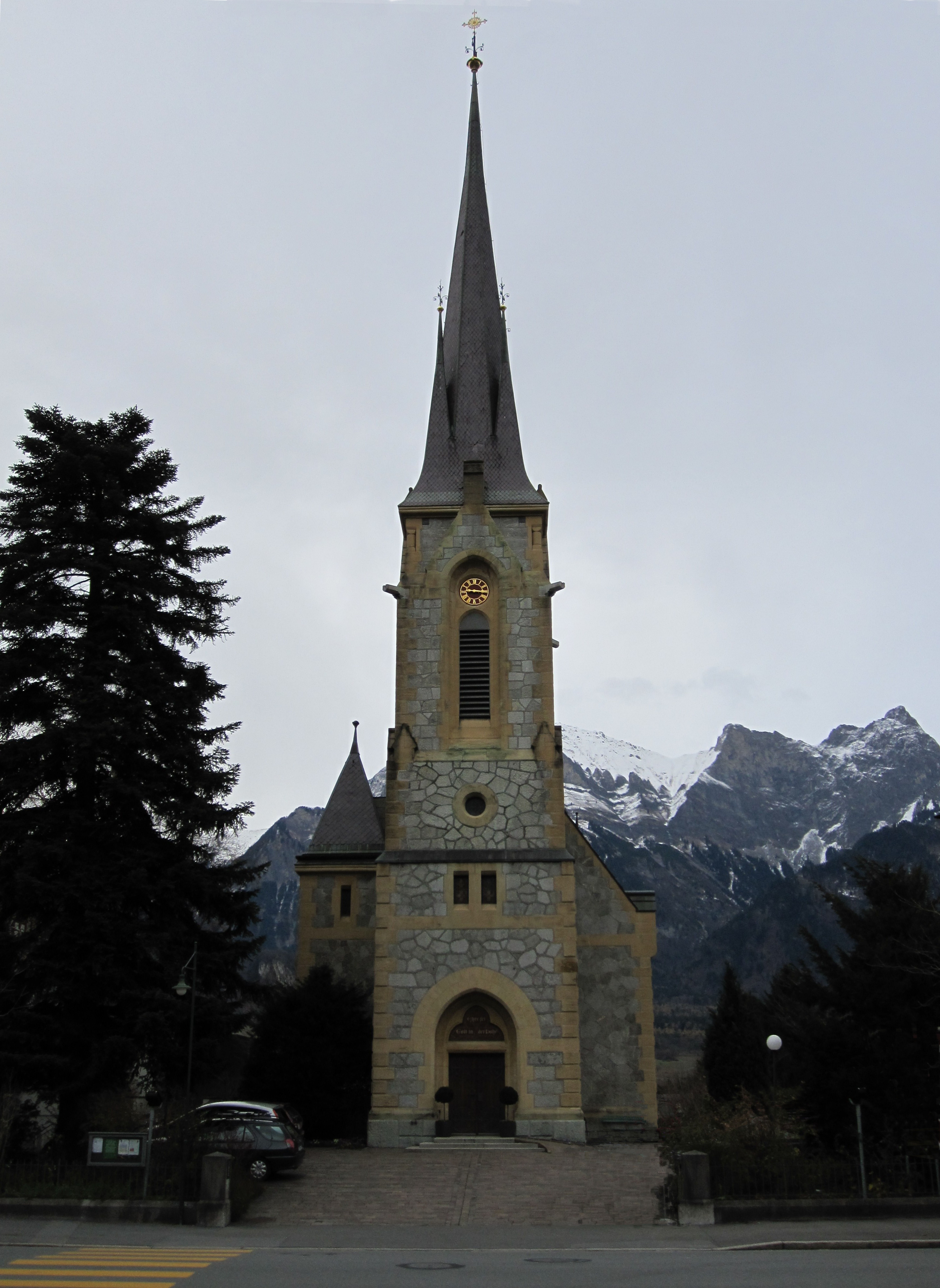 Die Evangelische Kirche Bad Ragaz, erbaut 1887-1890 nach Entwurf des Berliner Architekten Johannes Vollmer; örtliche Bauleitung: Ferdinand Wachter, St. Galler Architekt; äusserlich unverändert erhalten.